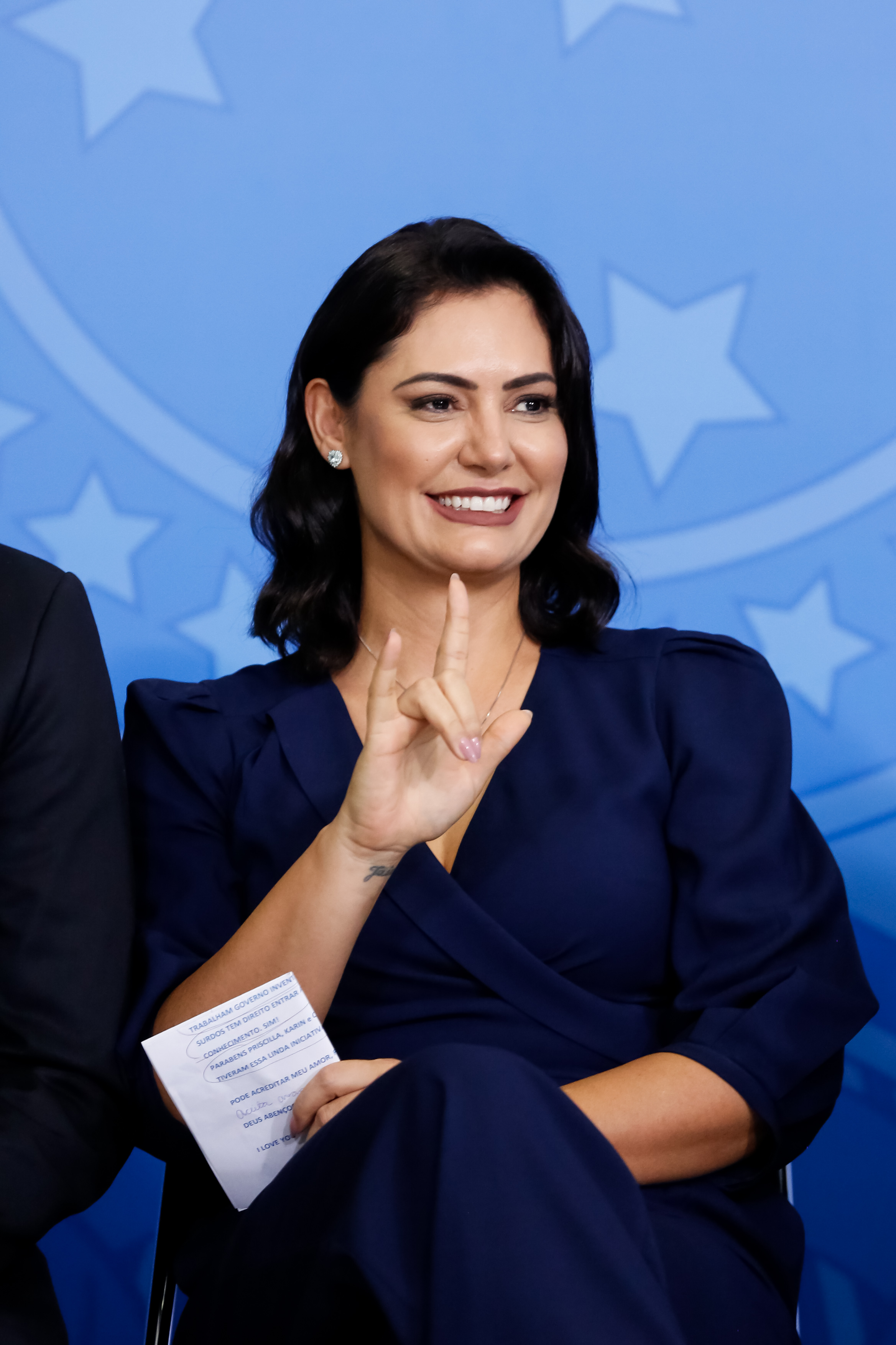 (Brasília - DF, 26/09/2019) Solenidade do Dia Nacional dos Surdos e Lançamento do LibrasGOV. Foto: Carolina Antunes/PR